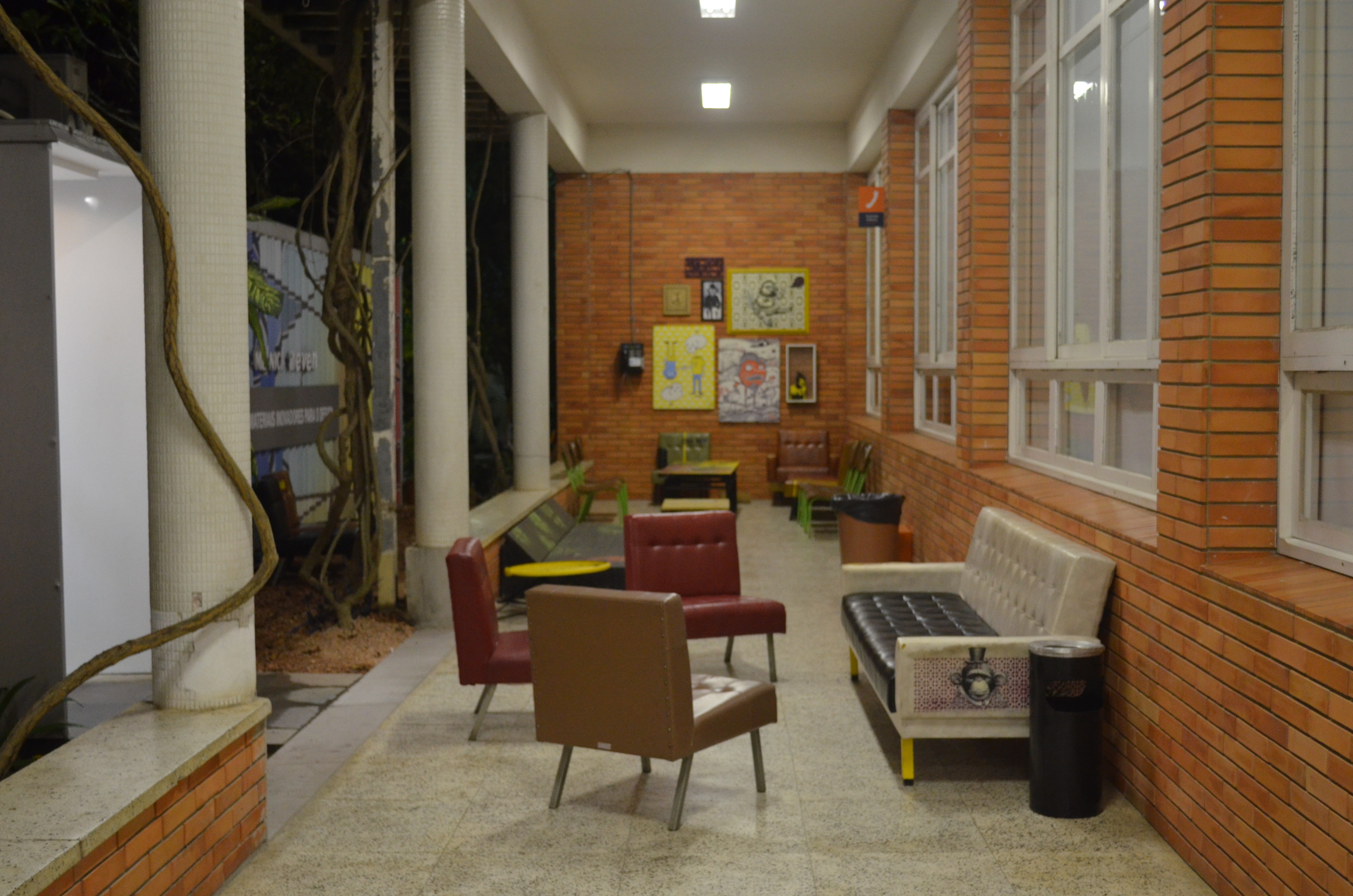 Hall de entrada do Campus Porto Alegre da Unisinos - Universidade do Vale do Rio dos Sinos